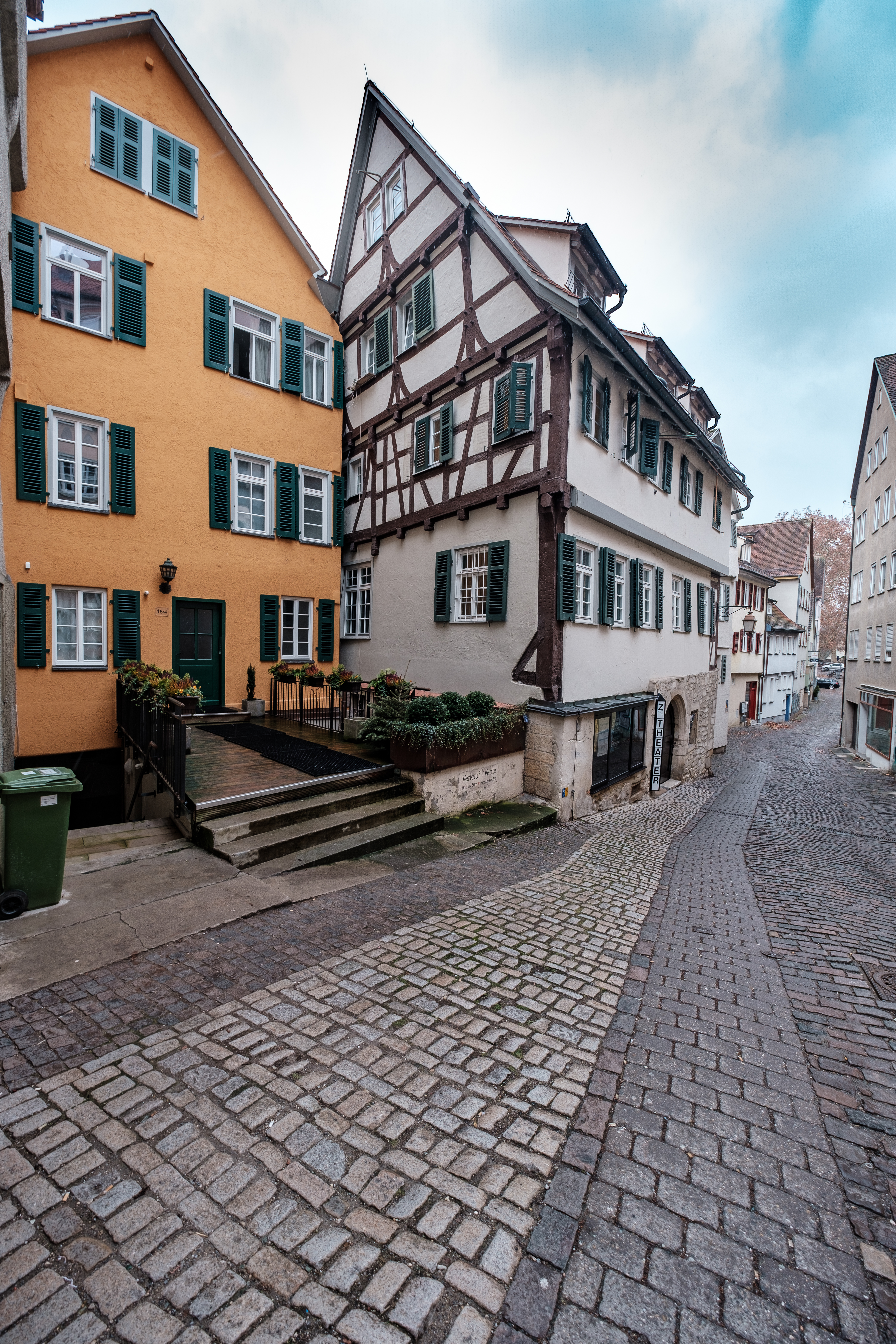 Zimmertheater in Tübingen